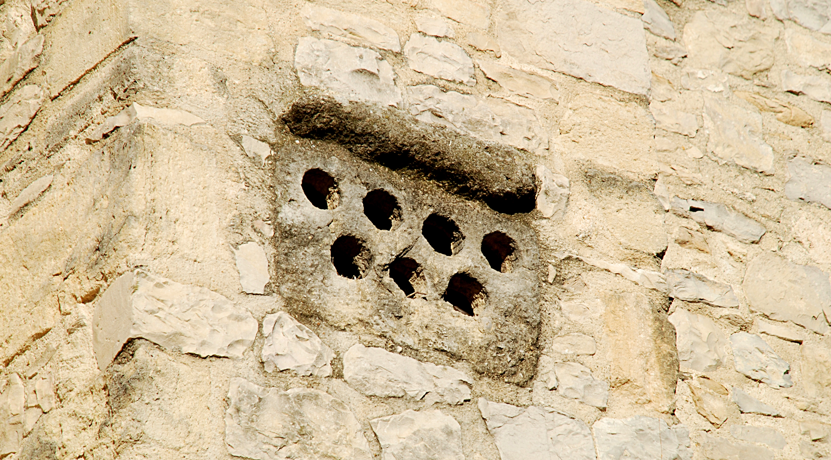 France - Gard - Église Saint-Saturnin de Calvisson